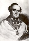 Mgr Jacques-Marie Antoine Célestin Dupont, évêque de Saint-Dié puis archevêque d'Avignon puis de Bourges et cardinal de la sainte église romaine